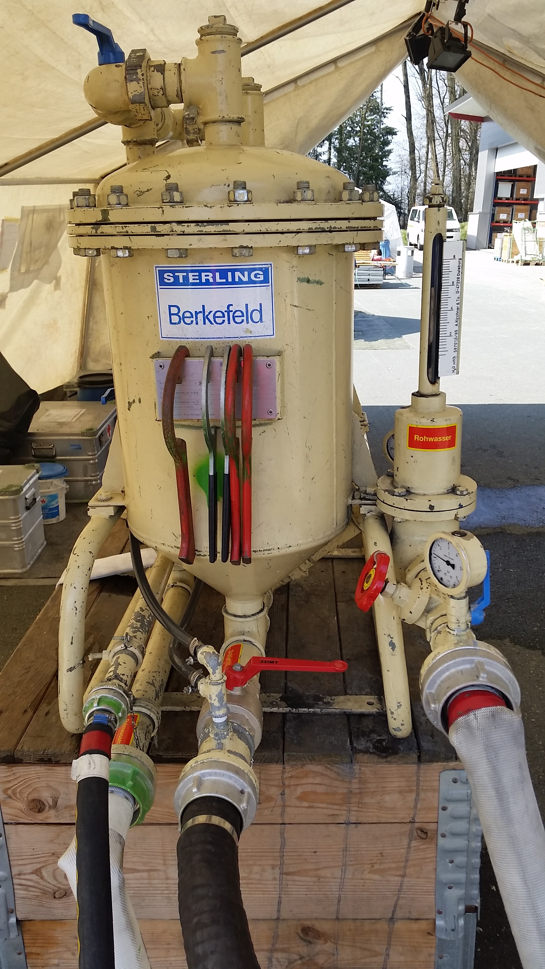 Berkefeld-Filter mit einer Leistung von 6m³/h.